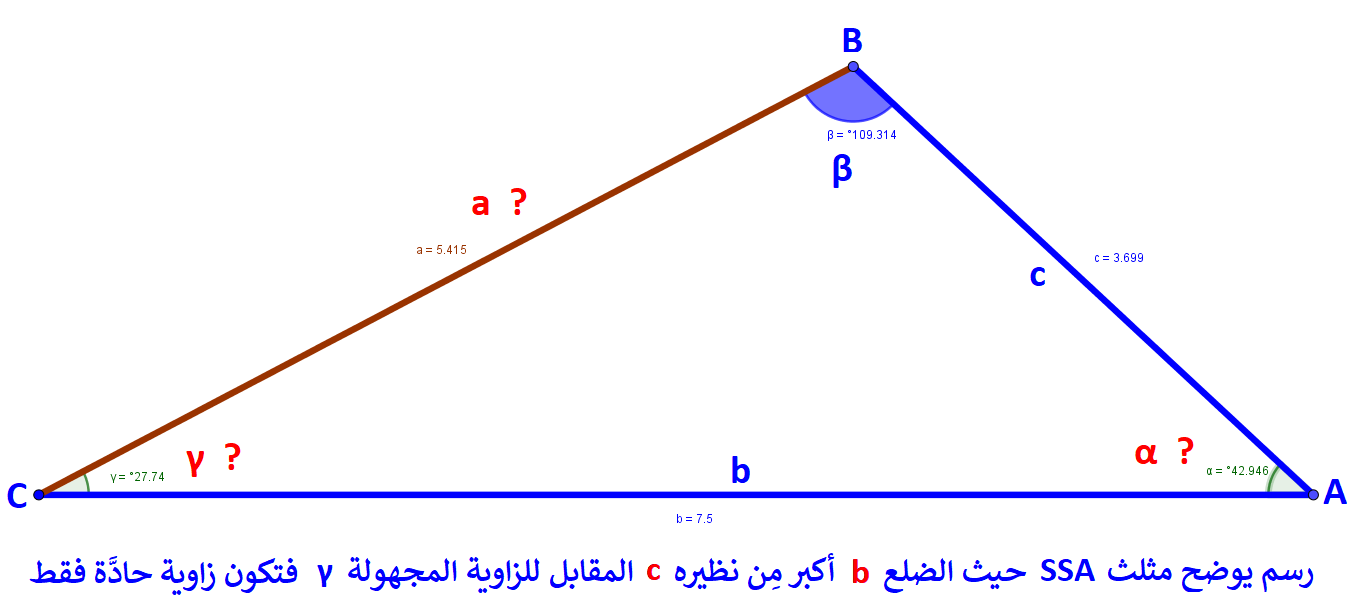 رسم توضيحي لمثلث من نوع SSA فيه الضلع المُقابِل للزاوية المعلومة أكبر مِن نظيره المقابل للزاوية المجهولة فيكون هناك احتمال وحيد لها وهو كونها حادة.